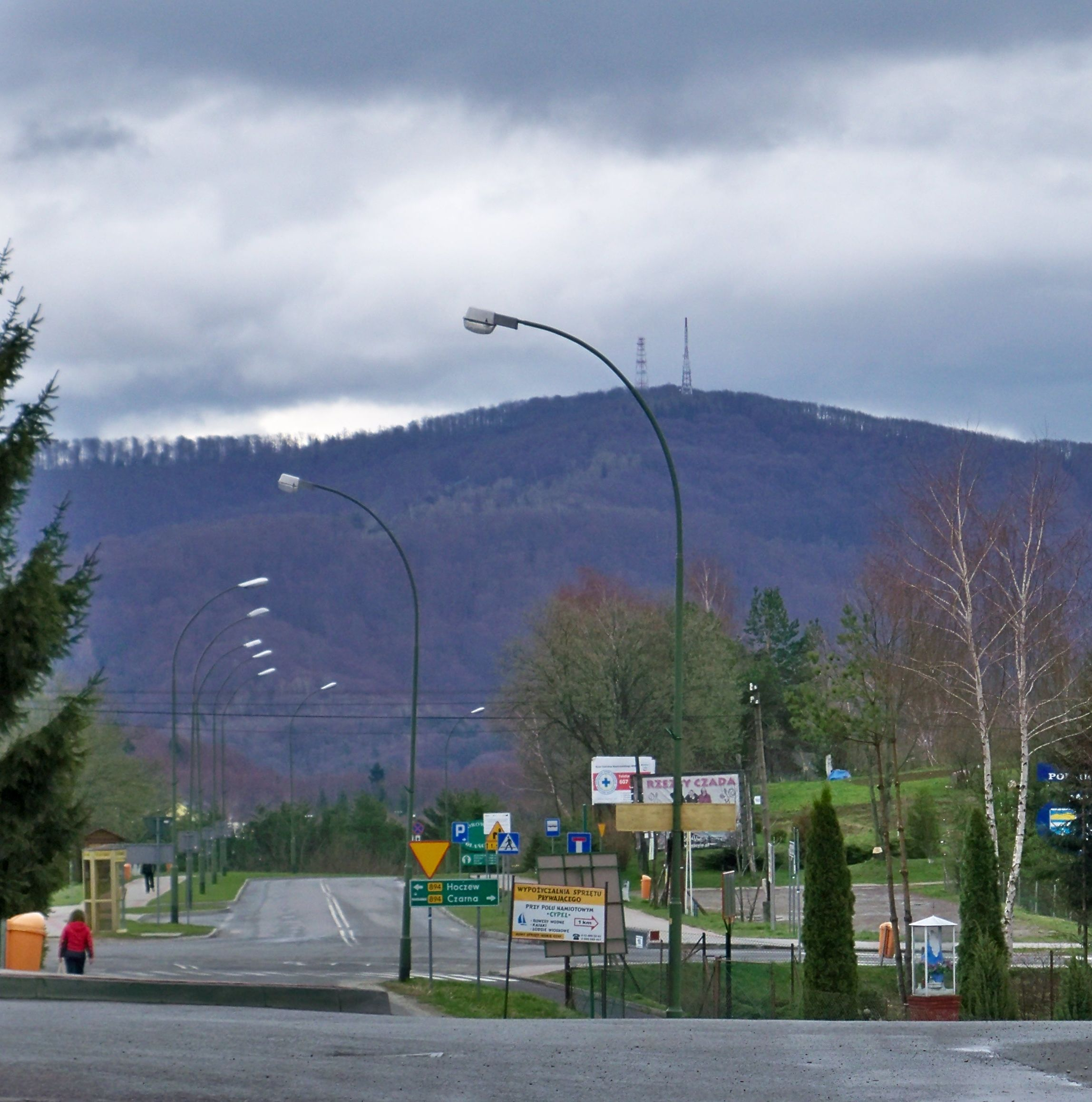 Jawor (Góry Sanocko-Turczańskie) widziany z Polańczyka